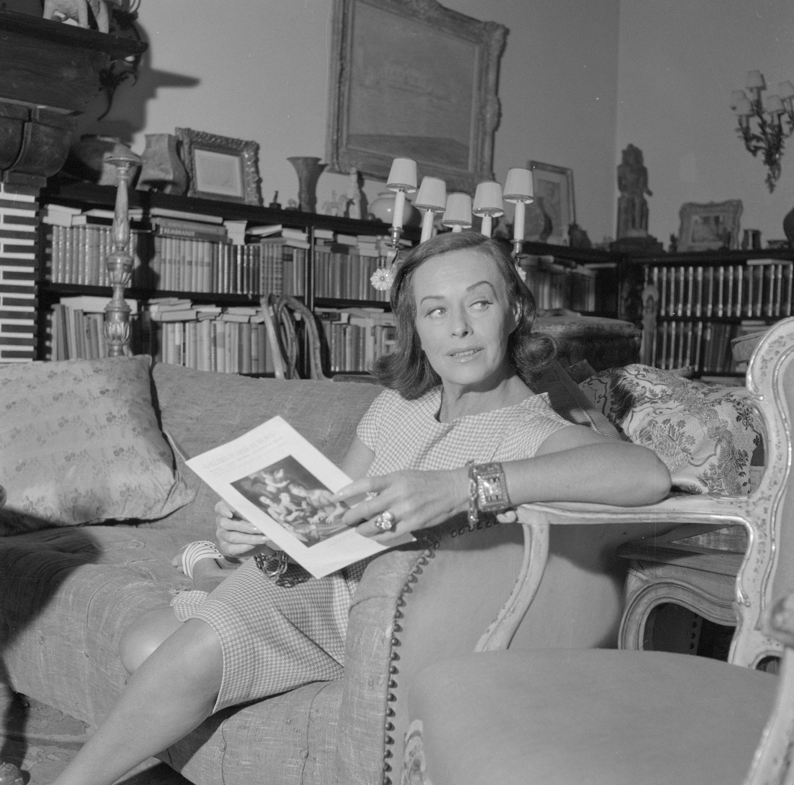 Collectie / Archief : Fotocollectie Van de Poll Reportage / Serie : Bezoek aan de Duitse auteur Erich Maria Remarque en de Amerikaanse actrice Paulette Goddard in hun villa in het Zwitserse Porto Ronco Beschrijving : Paulette Goddard in de woonkamer van de villa in Porto Ronco met een boekje Datum : oktober 1961 Locatie : Lago Maggiore, Zwitserland Trefwoorden : acteurs, interieurs, woningen Persoonsnaam : Goddard, Paulette Fotograaf : Poll, Willem van de Auteursrechthebbende : Nationaal Archief Materiaalsoort : Negatief (6x6) Nummer archiefinventaris : bekijk toegang 2.24.14.02 Bestanddeelnummer : 254-4749